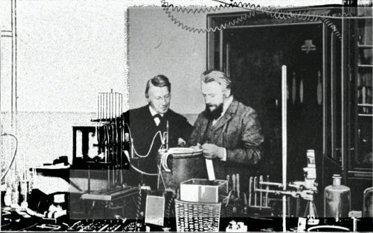 Wilhelm Ostwald (* 21. Augustjul./ 2. Septembergreg. 1853 in Riga; † 4. April 1932 in Leipzig)